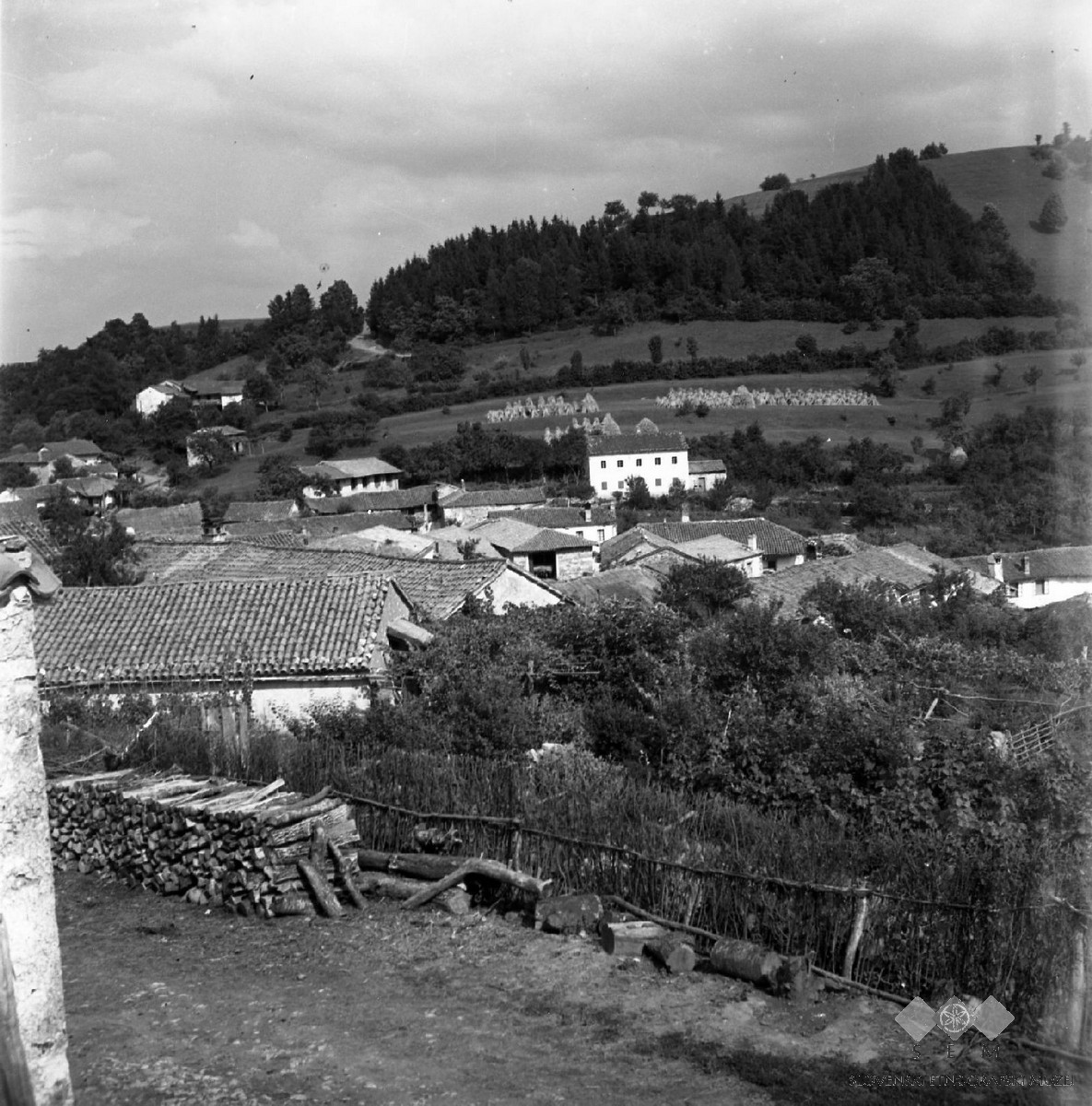 Pogled na del vasi, Barka.